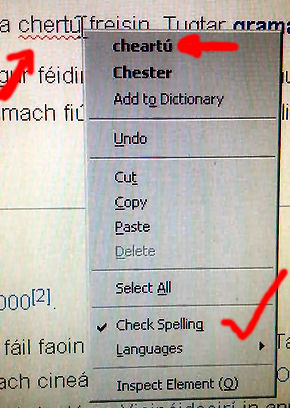 Gaelspell litriú Kevin Scannell Irish spell checker Gaeilge for Firefox